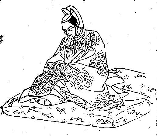 三条実万